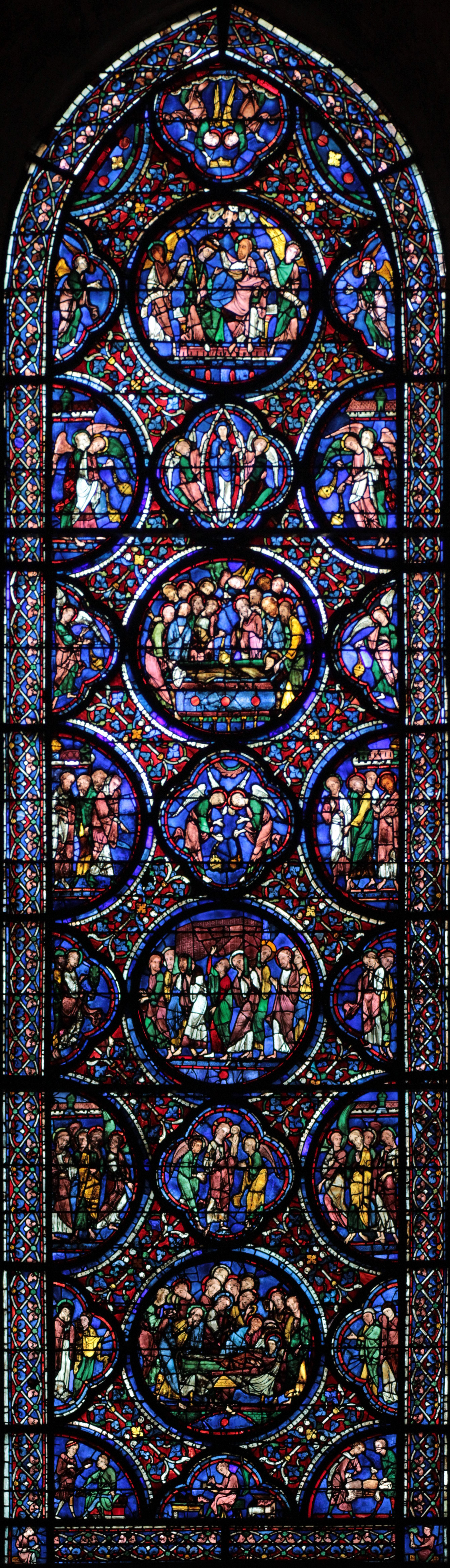 Chartres vitrail 042 - Mort et Assomption de la Vierge. Assemblage de file:Vitrail Chartres-042 a.jpg et file:Vitrail Chartres-042 b.jpg